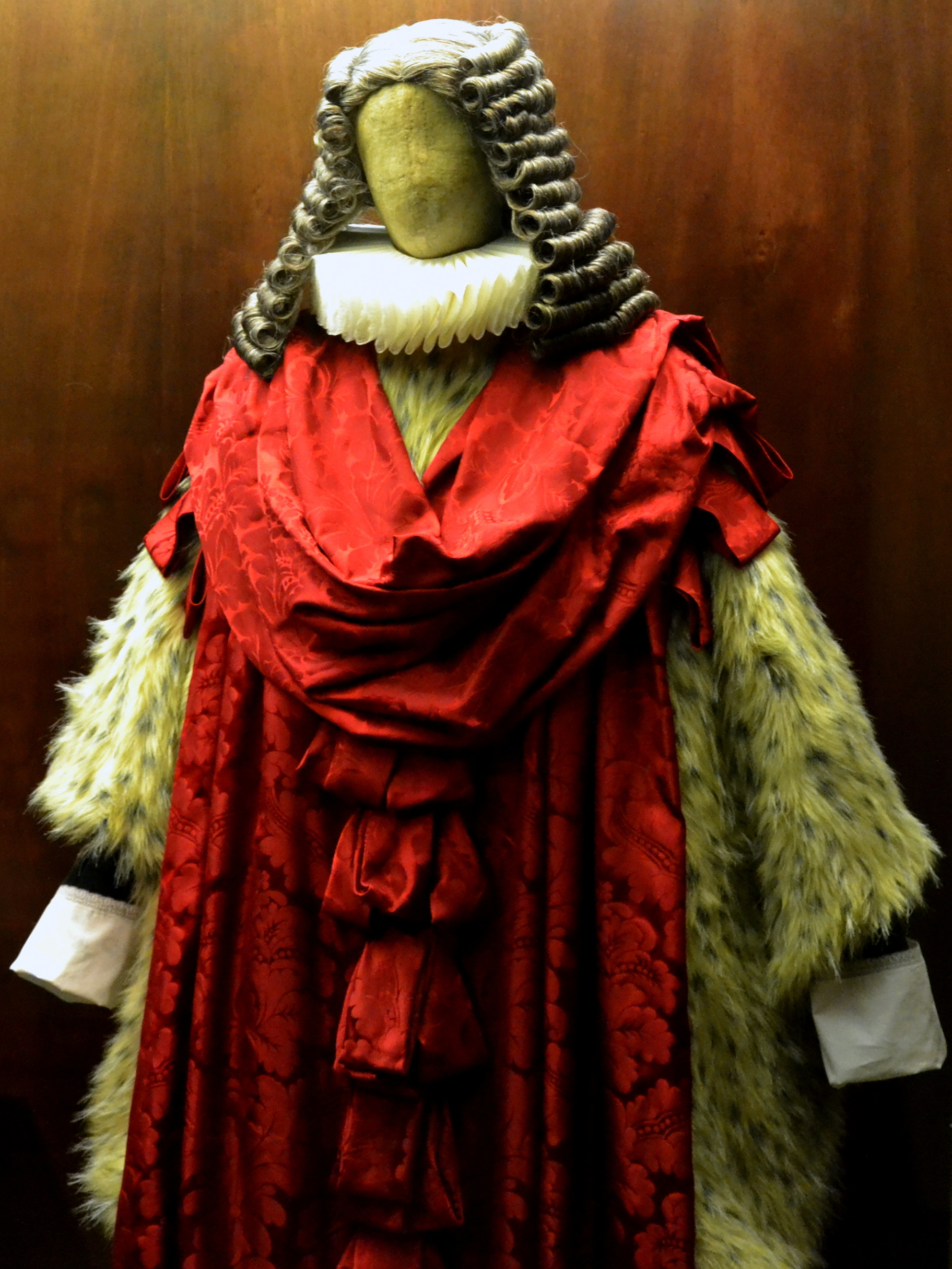 Recreació moderna de la vestimenta d'un conseller del Consell de Cent de Barcelona a principis del segle XVIII